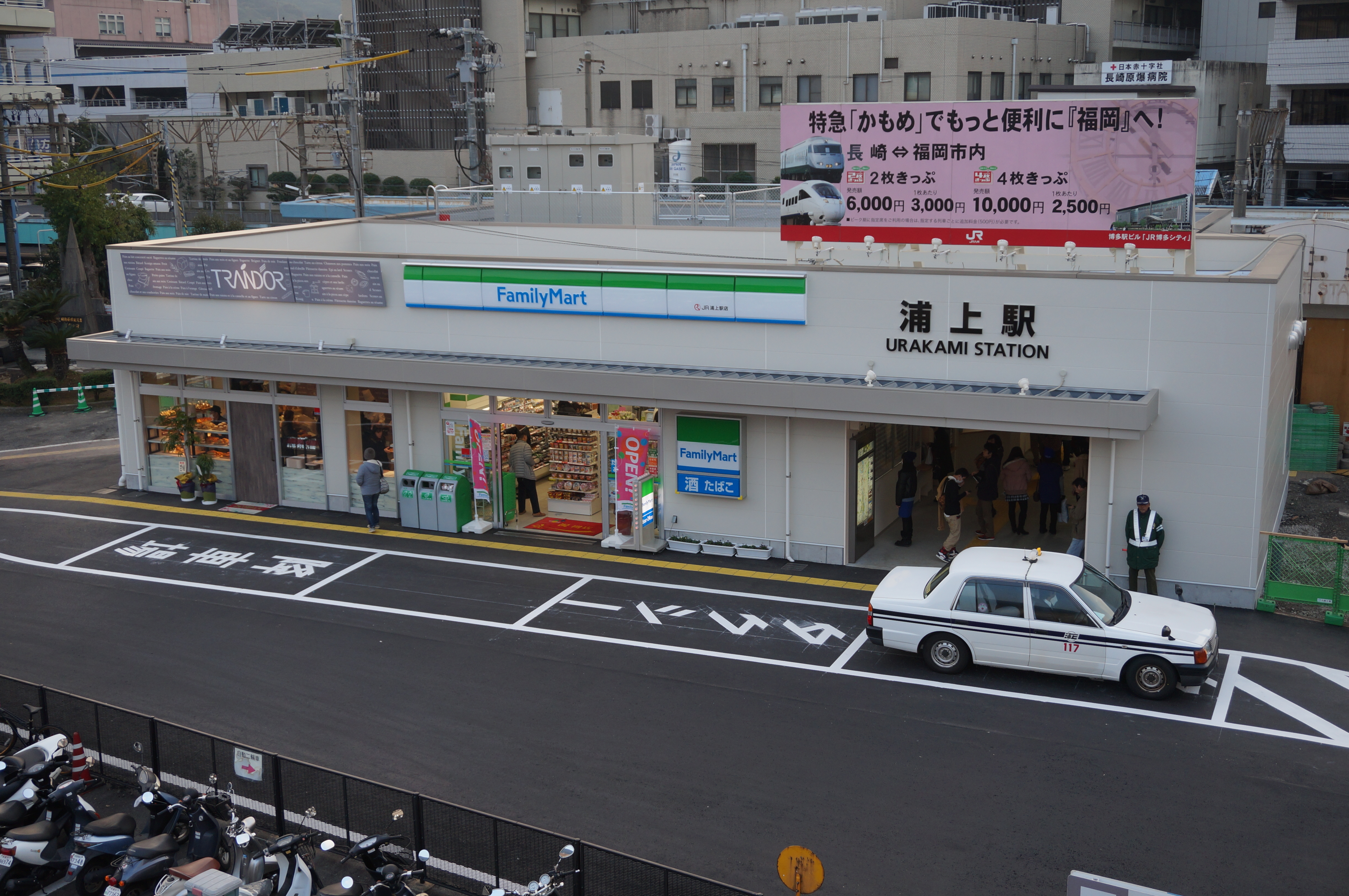 浦上駅仮駅舎